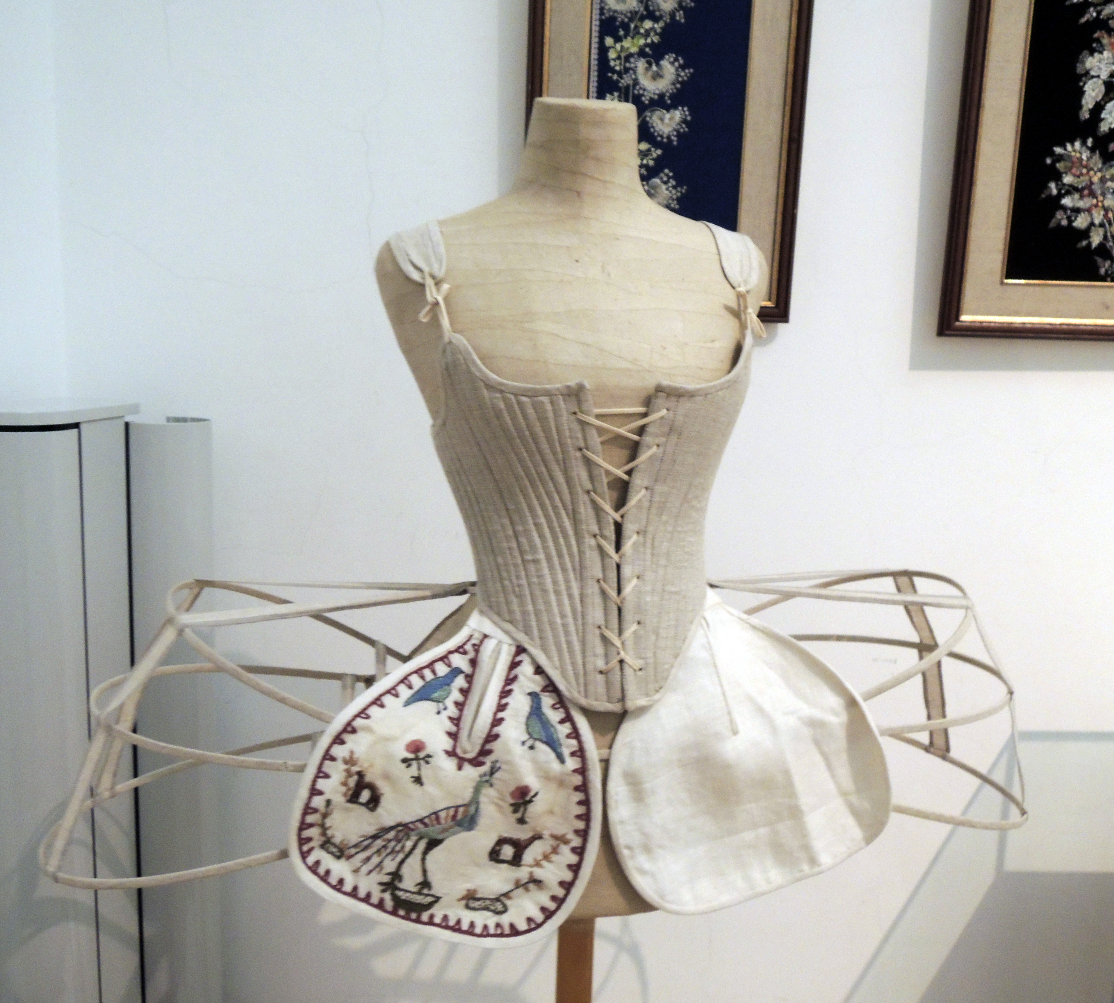 Фижмы (около 1760). Реконструкция с оригинала из Музея моды и текстиля (Франция). Курсовая работа студента 3-го курса А. Образцовой (педагог - О. Поликарпова). Льняное полотно, сталька. Кафедра сценического костюма Школы-студии МХТ им. А.П. Чехова